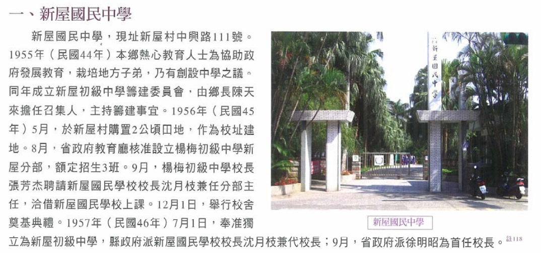 新屋國中創校史